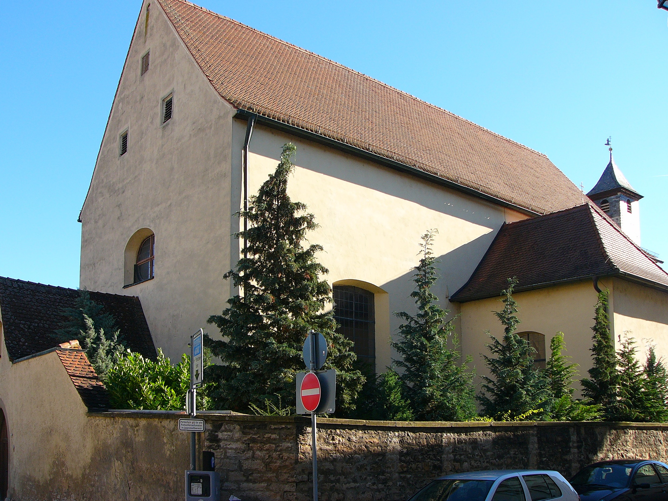 Ehem. Kapuzinerklosterkirche Himmelfahrt Mariä und hl. Franziskus Seraphikus; 1631-1652, 1828 profaniert. This is a photograph of an architectural monument.